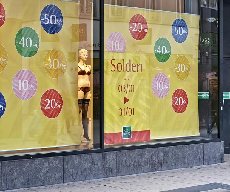 Скидки в магазине